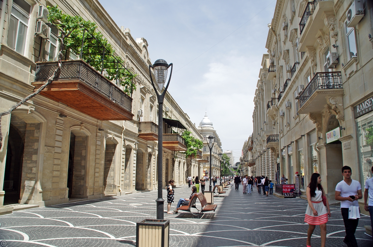 Bakı, Nizami küçəsi